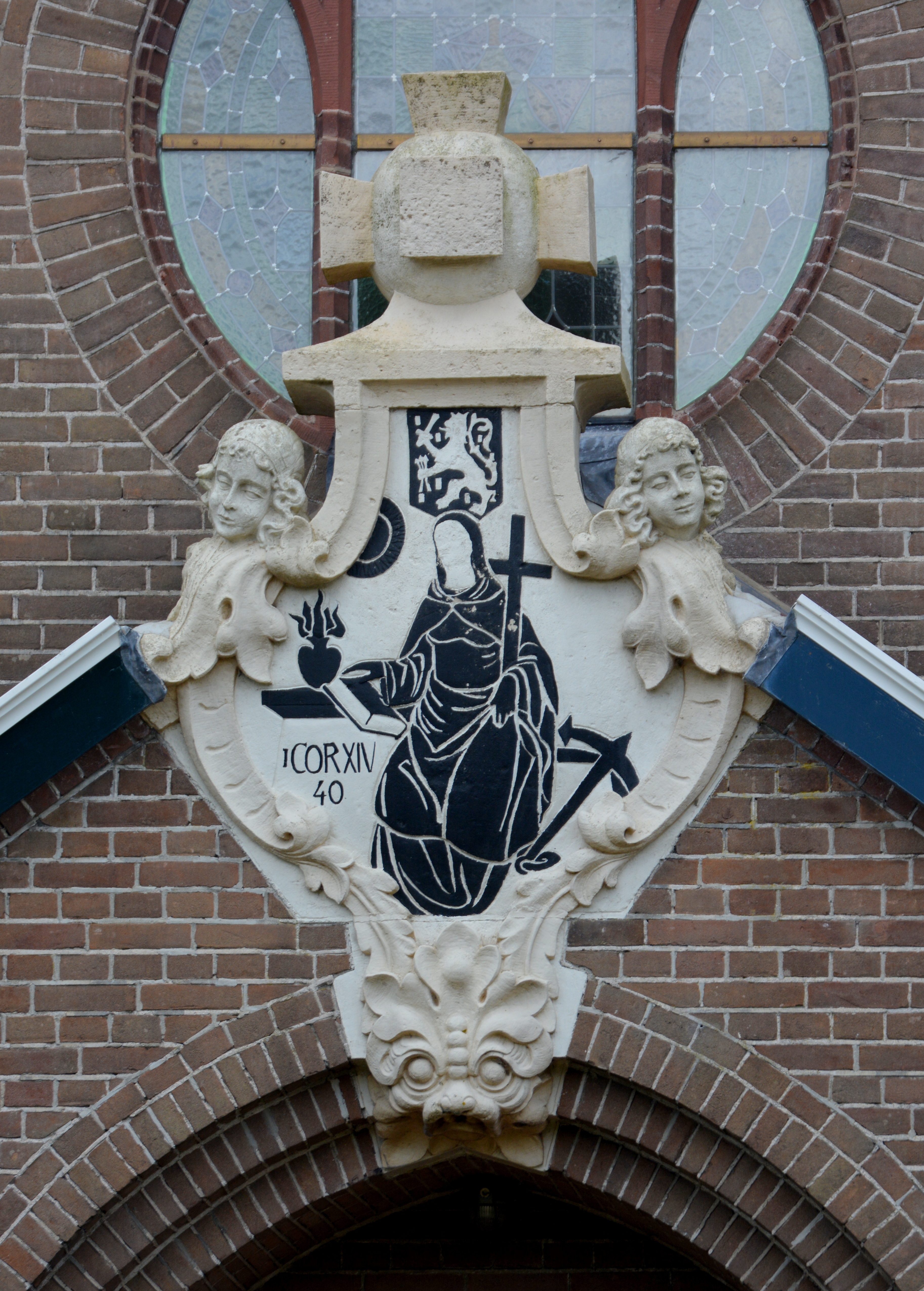 Opeinde, gereformeerde kerk (hersteld)